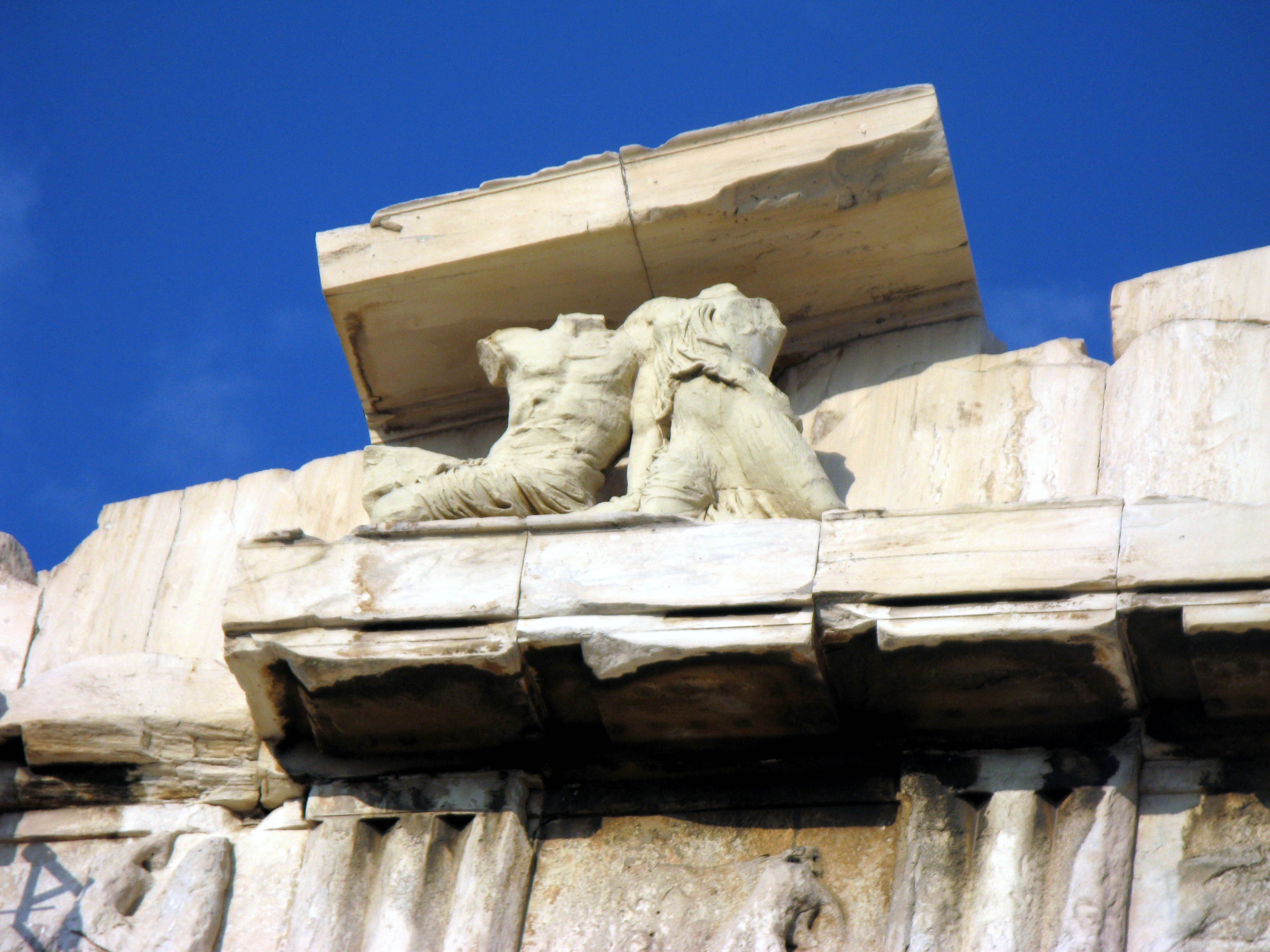 Фронтон Парфенона